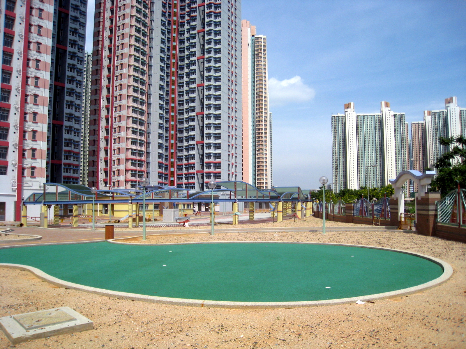 Tin Ching Estate 天晴邨